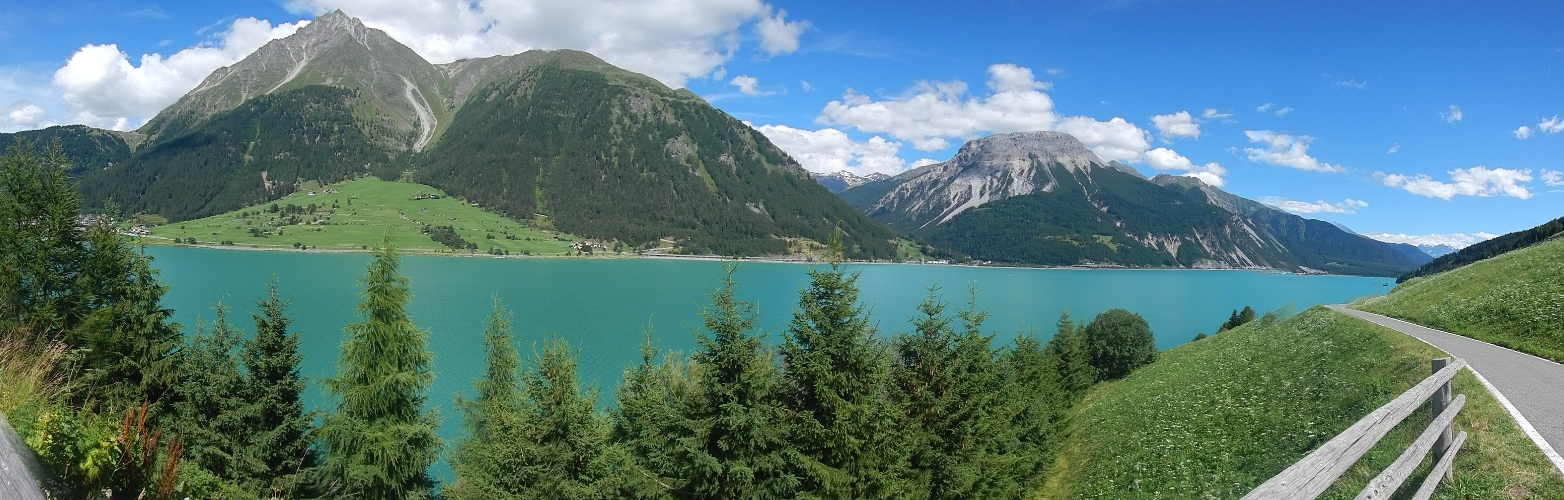 Reschensee